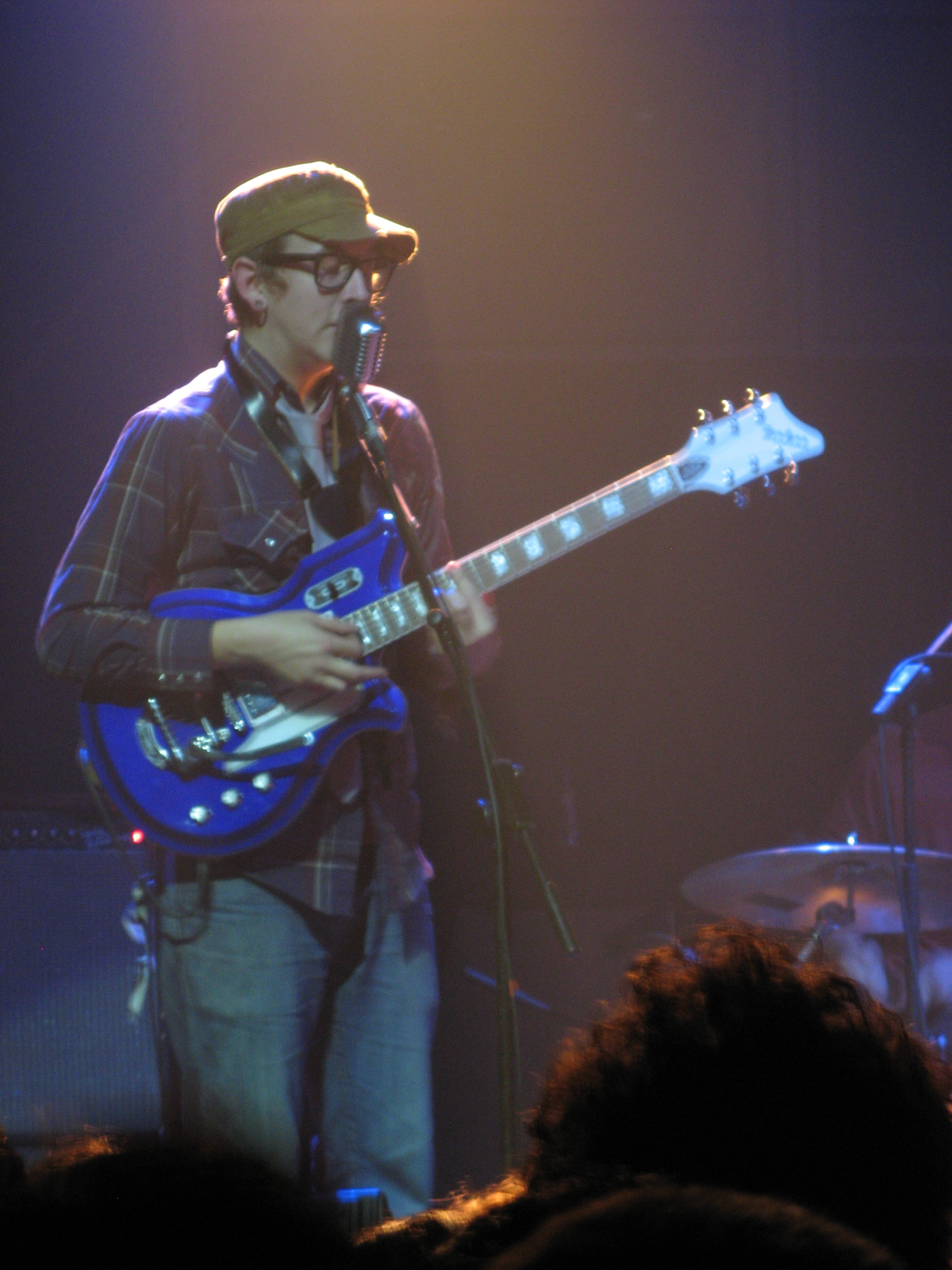 Concierto de Micah P. Hinson en Madrid, España. 2008.